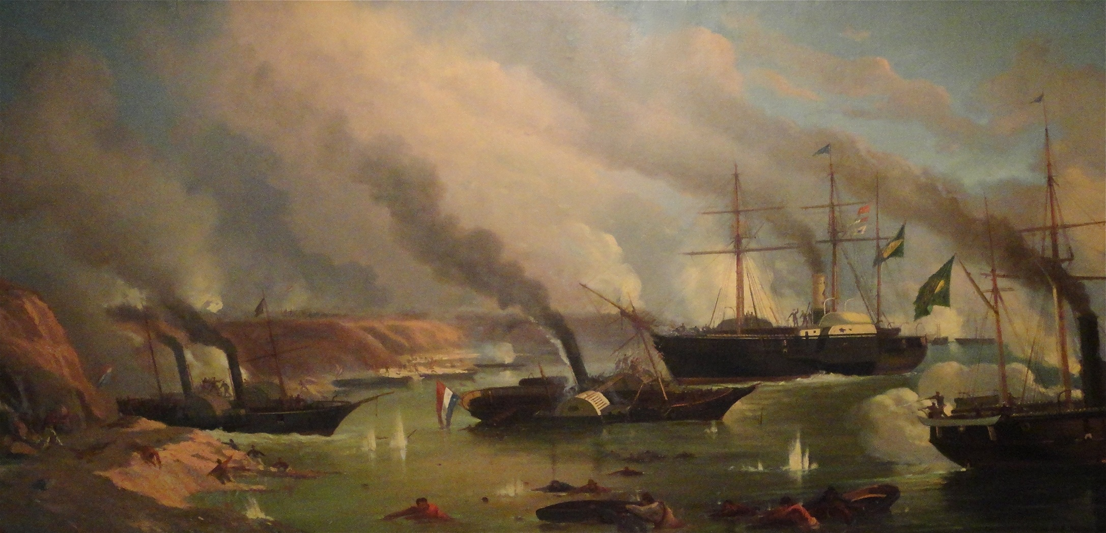 Eduardo de Martino - Batalha Naval do Riachuelo